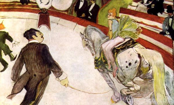 Henri de Toulouse-Lautrec, "In the Circus Fernando The Ringmaster" (aka “Cirque Fernando: The Equestrienne”), oil, 1887-88 (Art Institute of Chicago)